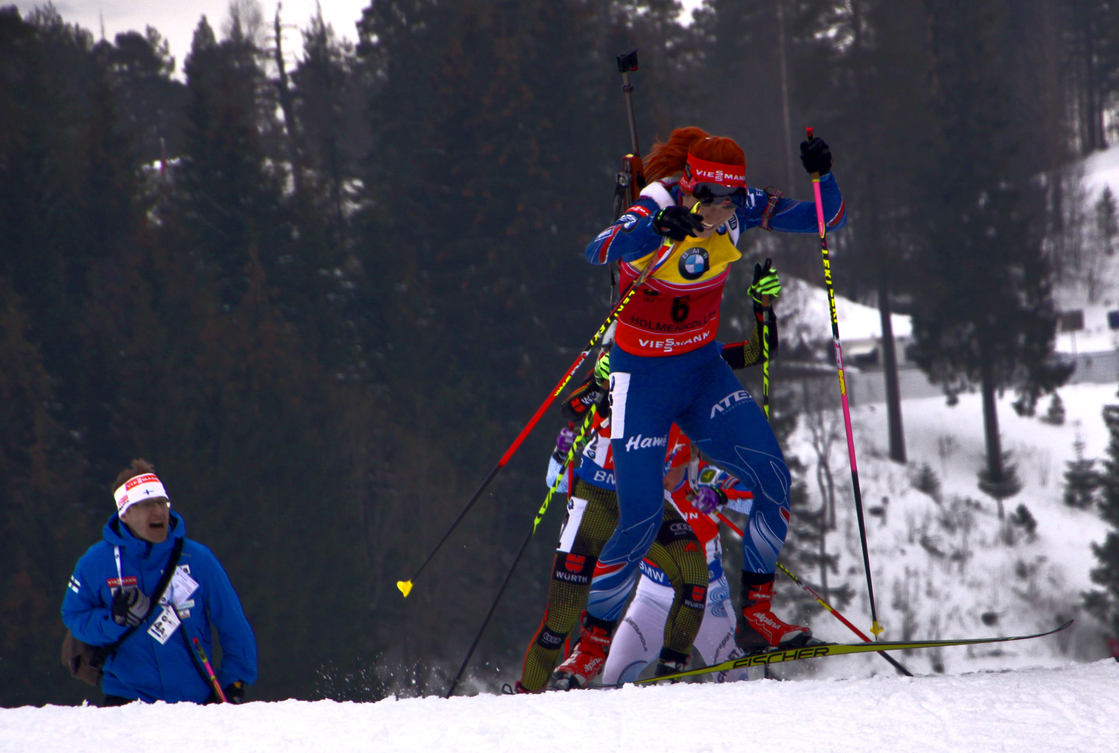 Oslo. Gabriela Soukalova aux championnats du monde de biathlon.